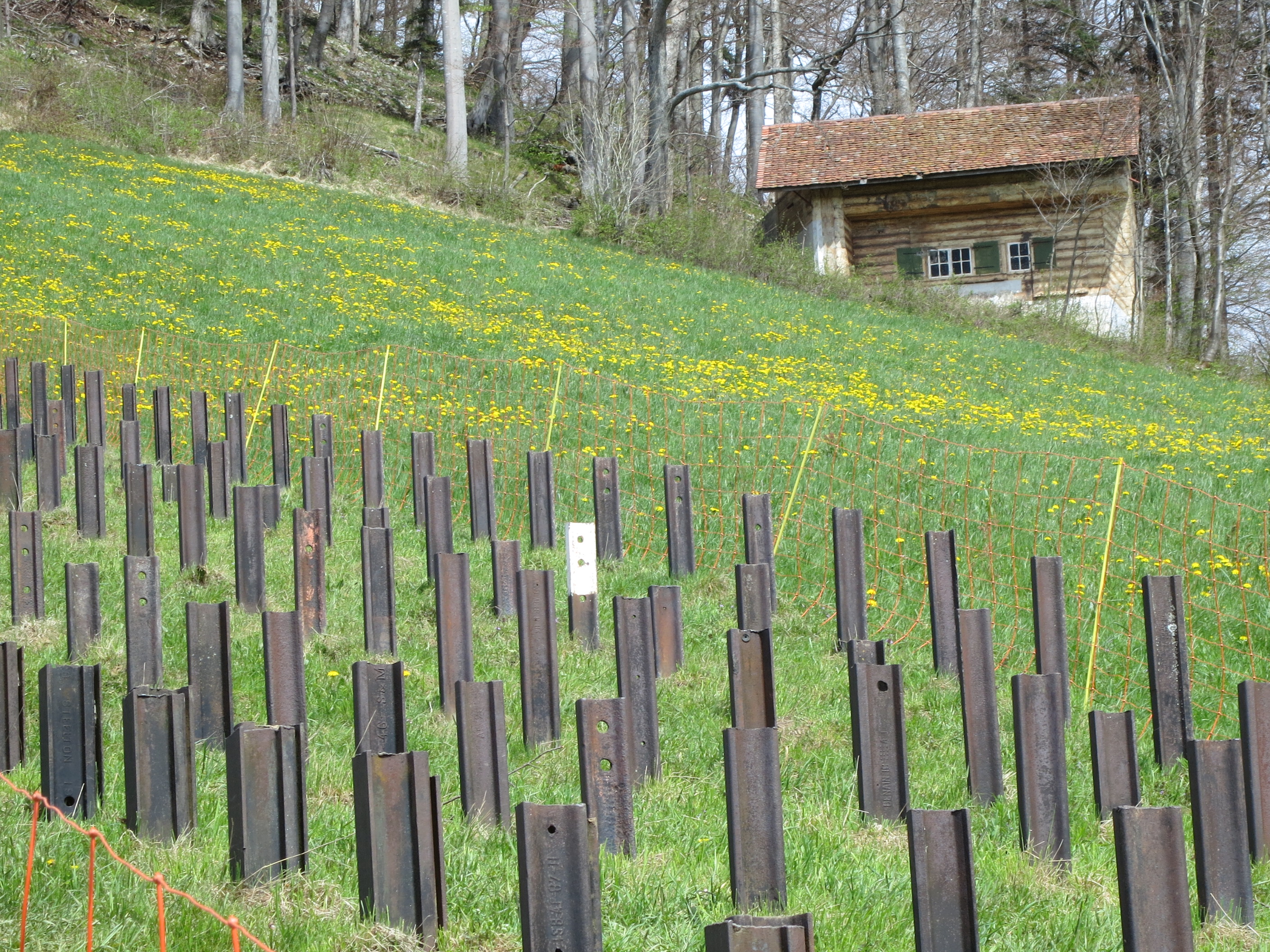 Bunker Rüeblikeller, Challhöchi, Schweiz: Grenzbrigade 4